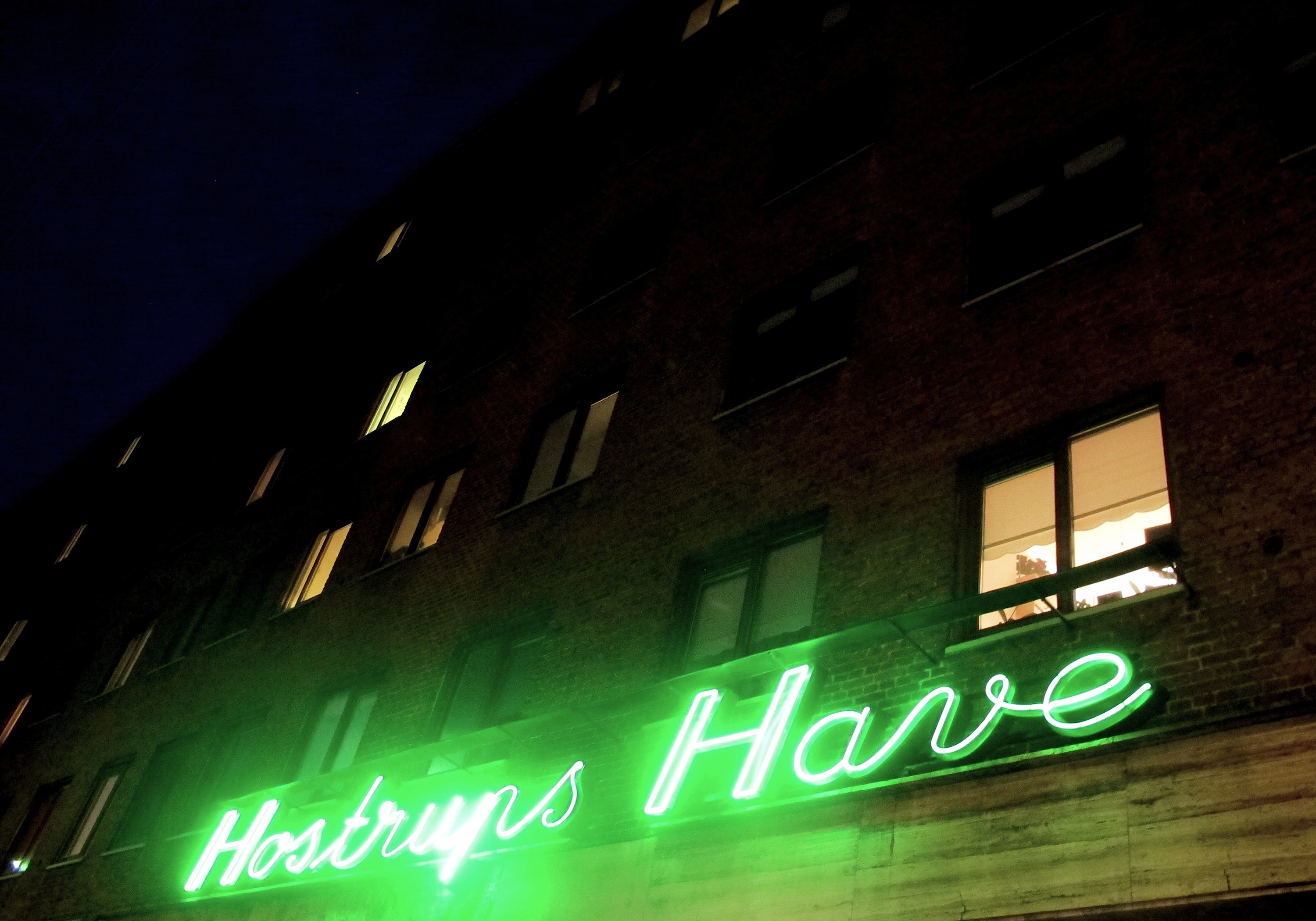 Over hovedporten fra Rolighedvej, hænger det originale neonskilt. Ejendommen Hostrups Have er udpeget som bevaringsværdig og er en af landets største modernistiske arkitekttegnede ejendomme.